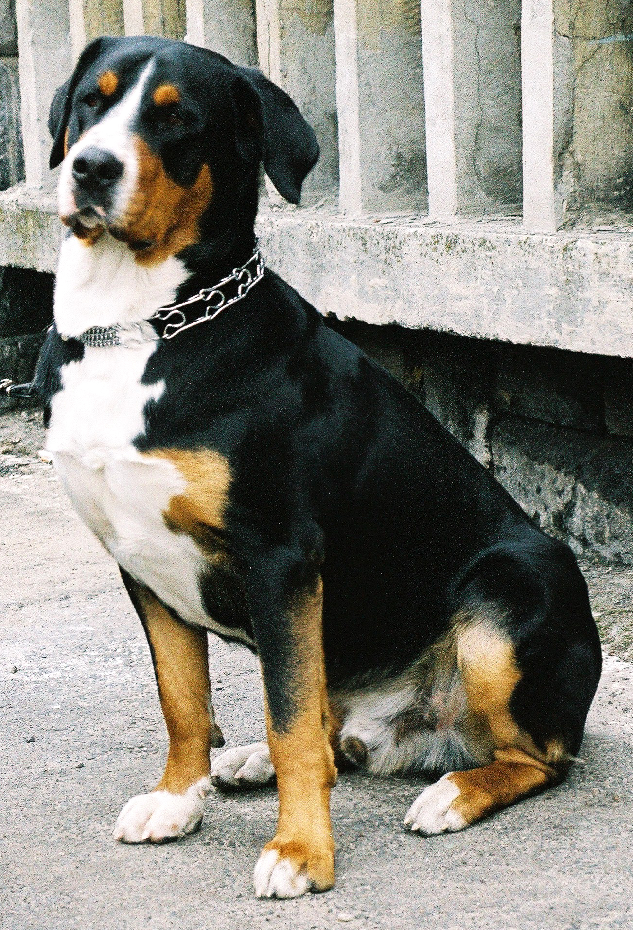 autor: Pleple2000 06:11, 5 April 2006 (UTC)